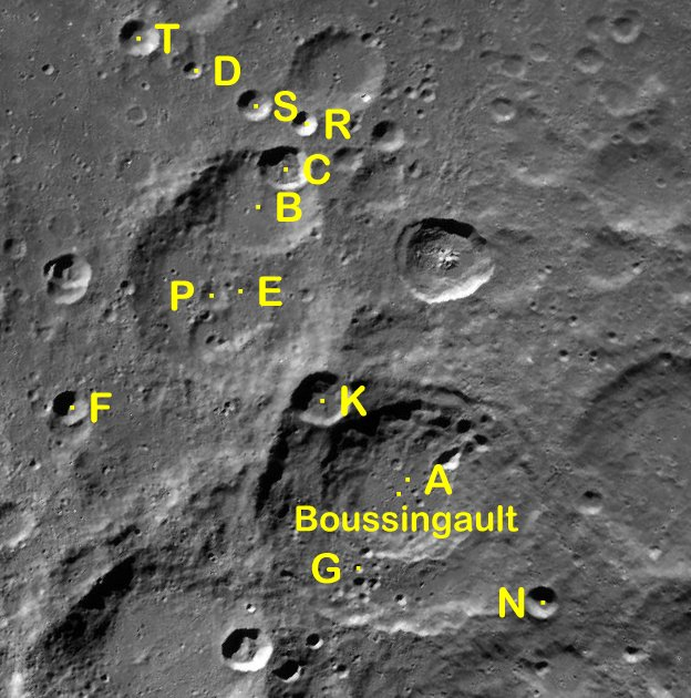 Cráter lunar Boussingault. Cráteres satélite. (Imagen LRO)